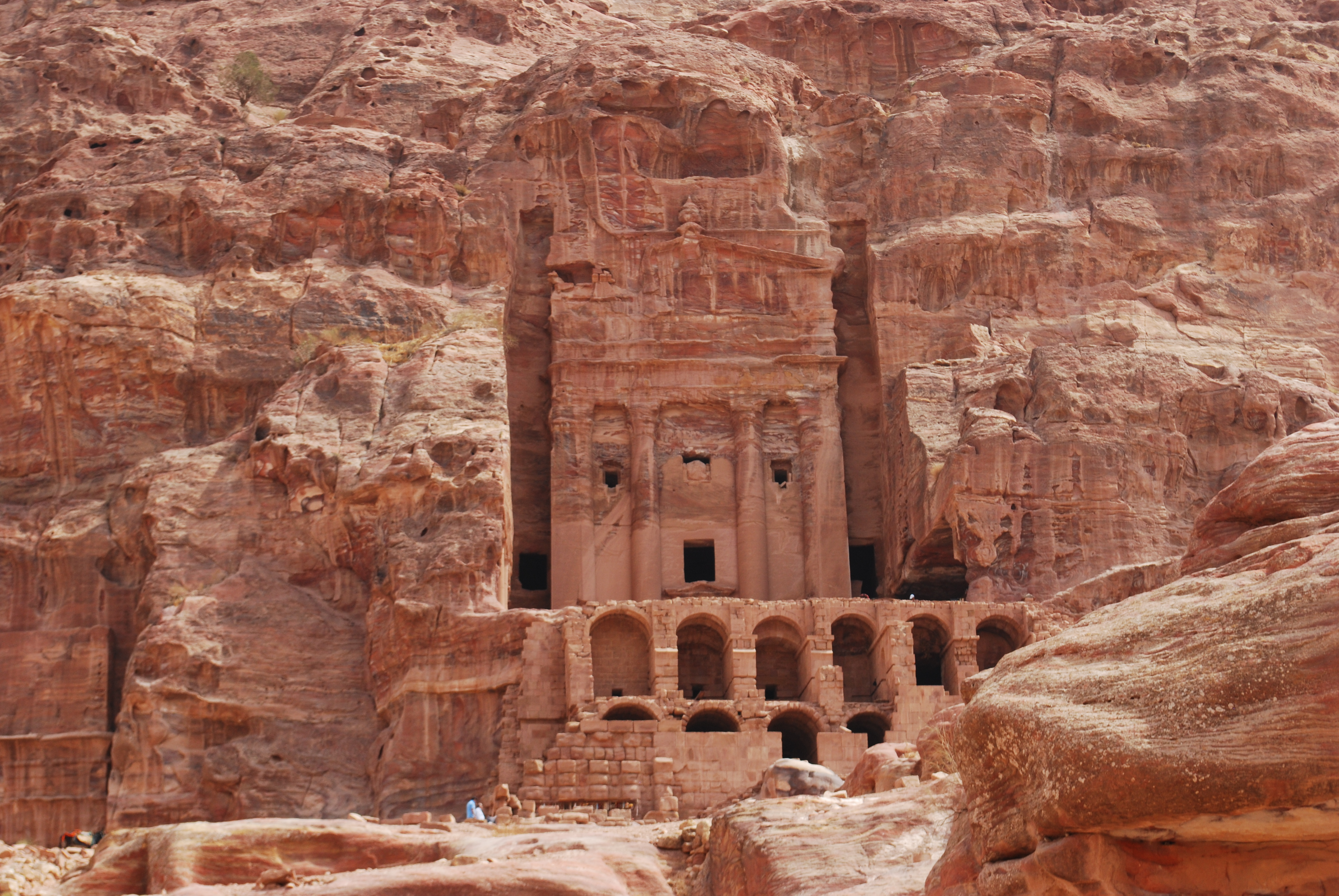 Les tombes des Rois, à Pétra.